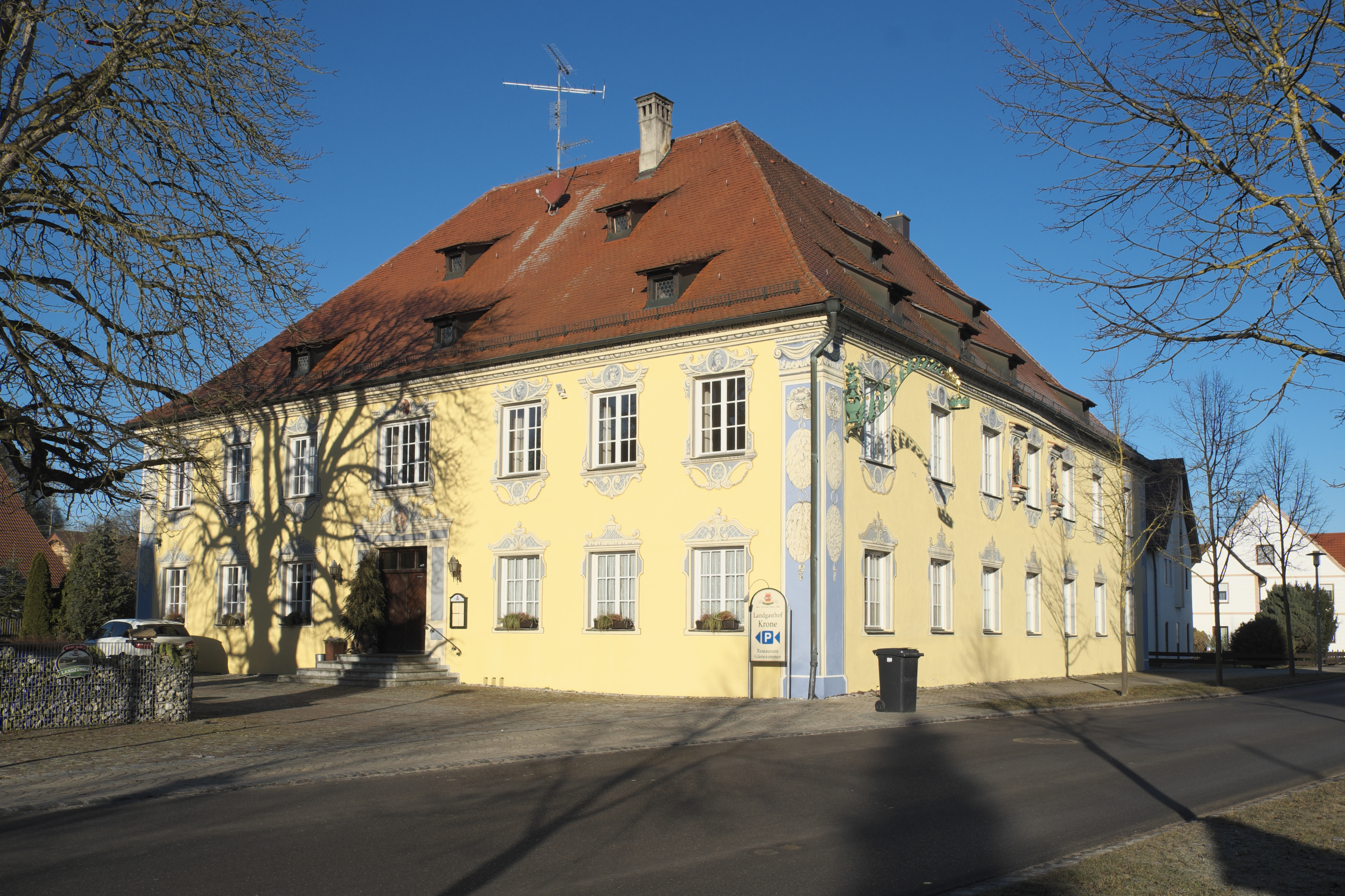 Gasthaus Zur Krone in Berkheim im Landkreis Biberach (Baden-Württemberg/Deutschland)